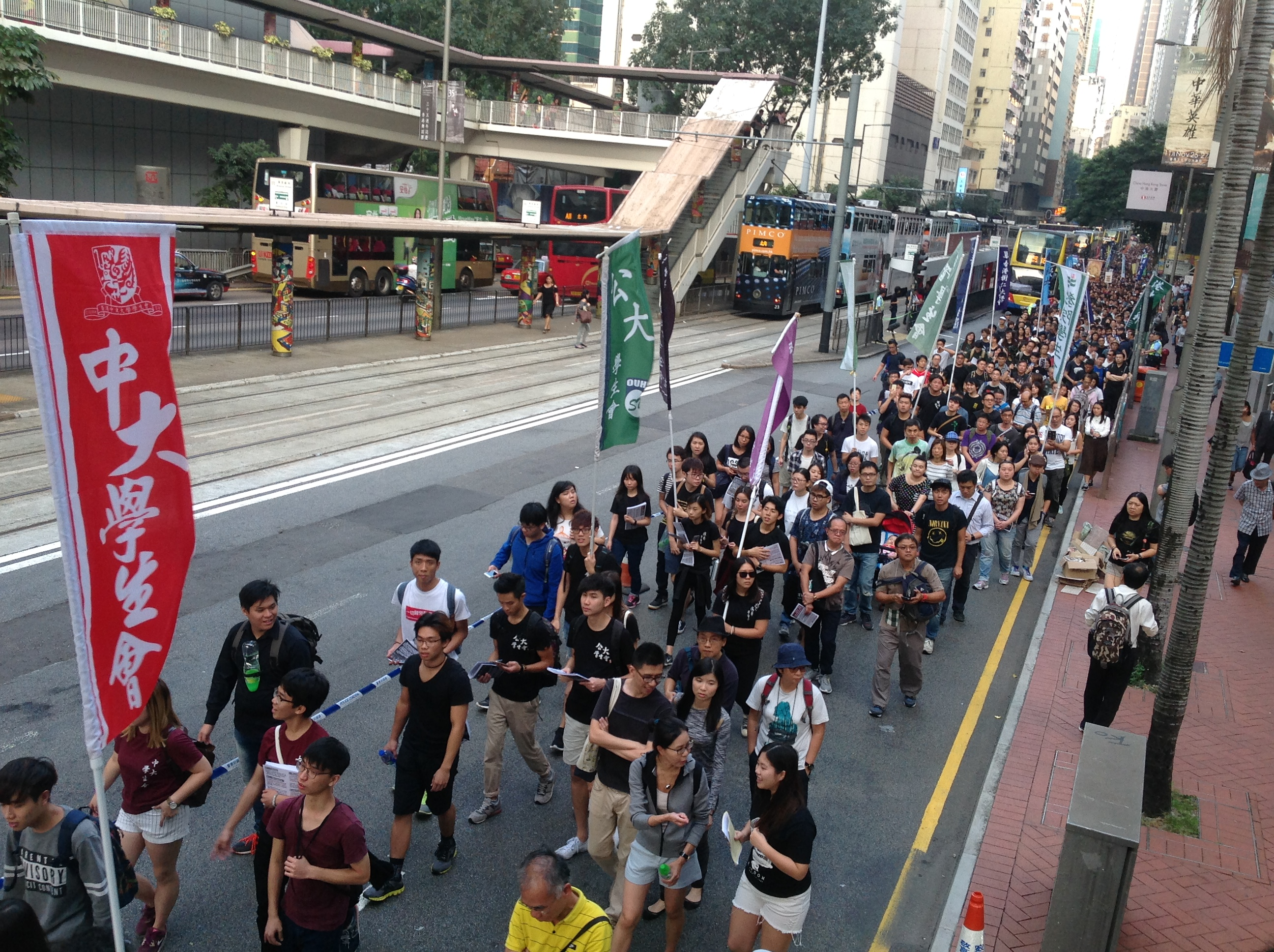 在中國人大常委會11月7日將就香港青年新政兩位議員宣誓風波，對基本法有關宣誓條例宣布釋法內容之際，香港民間人權陣線星期天發起各界“反對釋法大遊行”和集會，抗議人大在香港高等法院審理有關宣誓風波司法覆核案期間，主動對基本法第104條釋法，破壞香港獨立的司法制度。 在香港民陣發起反釋法大遊行後，數以千計的示威者繼續遊行到西環的中聯辦抗議人大釋法。8點半左右，示威者手舉雨傘再次沖擊警方防線，警方則狂噴辣椒噴劑還擊。警方調派大批警員增援，並將配備防暴頭盔的警員派至一線與示威者對峙。警方不斷呼籲示威者保持冷靜，不要衝擊警方防線，要求示威者盡快離開。 9點前，在中聯辦外與警察對峙的示威者突然撤離，輕往西區警署外的徳輔道西和西邊街道口，現場雙向交通中斷，一場自2014年雨傘運動後的佔領行動在醞釀中，現場至少有幾千之。十多分鐘後，警方開始廣​​播，要求佔路人士離開。 示威者在9點過後佔據了中聯辦外一段德輔道，並在中聯辦後門外與警方防線展開推撞，警方用辣椒噴霧還擊將示威者防線推後。示威者不斷呼喊反對釋法。 警方在中聯辦西邊的朝光街路口佈署第二道防線，並有警員從路旁的西區警署裡向警察傳遞防暴盾牌進一步部署防線。目前還不清楚警方何時清場。